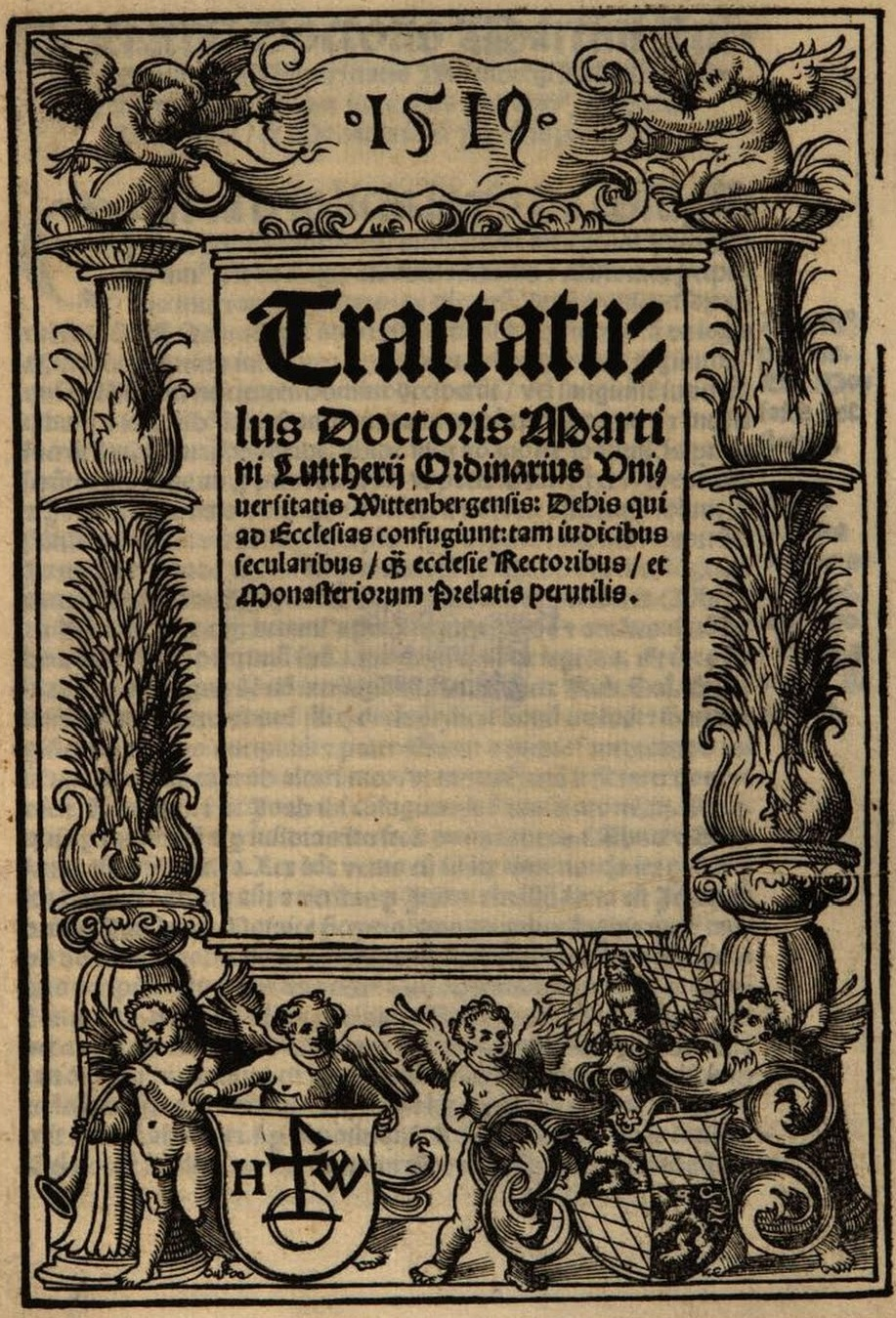 Martin Luther: Tractatulus de his qui ad ecclesias confugiunt ("Kleine Abhandlung über die, die in Kirchen flüchten"), über das Kirchenasyl, gedruckt 1517 und erneut 1520 (mit Jahreszahl 1519), verfasst vermutlich Anfang der 1510er Jahre, vgl. WA